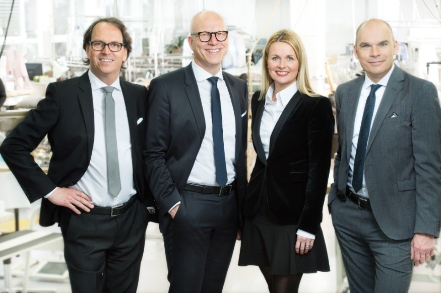 Die Unternehmensleitung seit 2014: Frank Seidensticker, Martin Friedrich, Dr. Silvia Bentzinger und Gerd Oliver Seidensticker (v.l.)